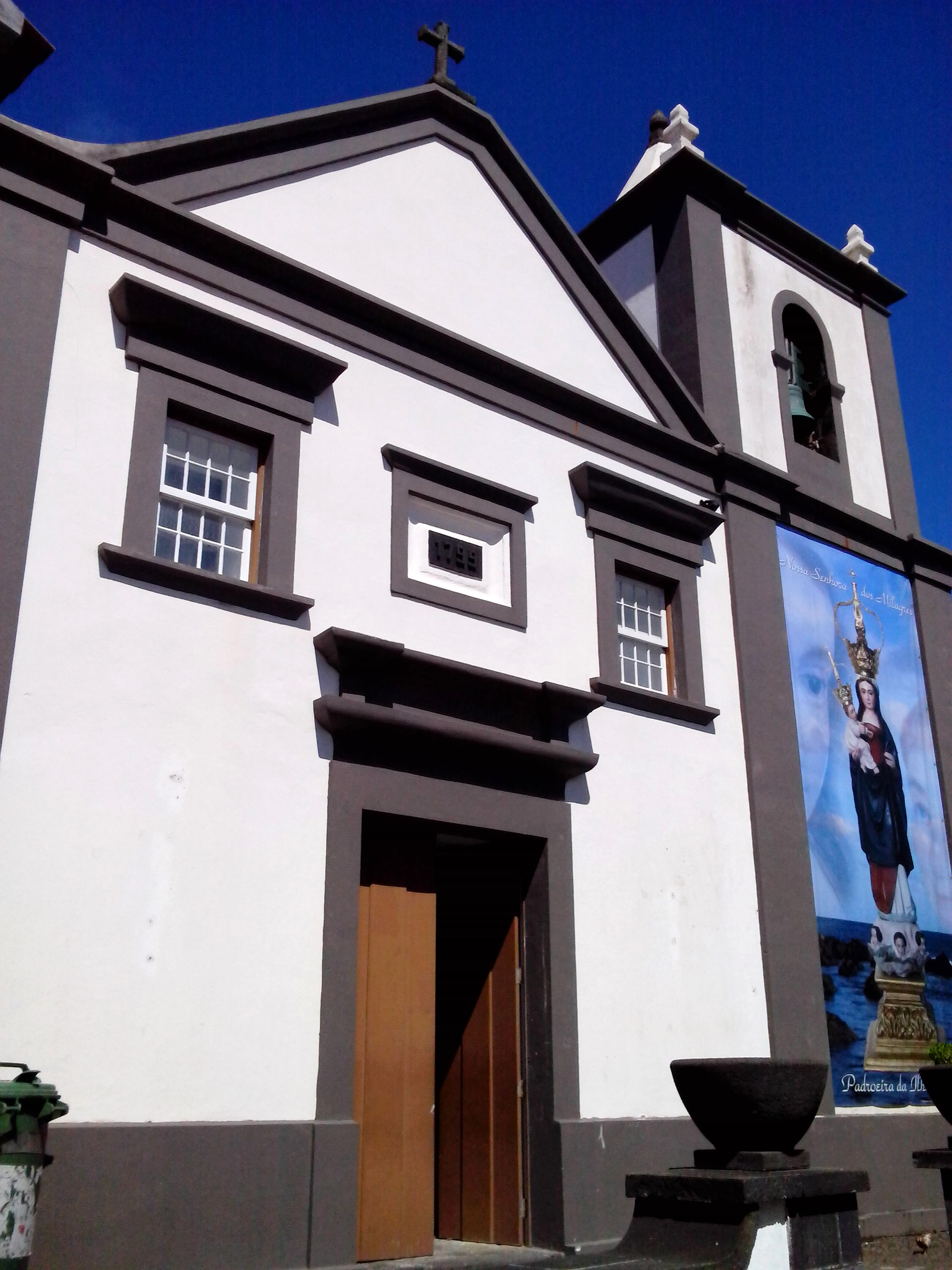 Ilha do Corvo, Igreja de Nossa Senhora dos Milagres, Arquivo de Villa Maria, ilha Terceira, Açores